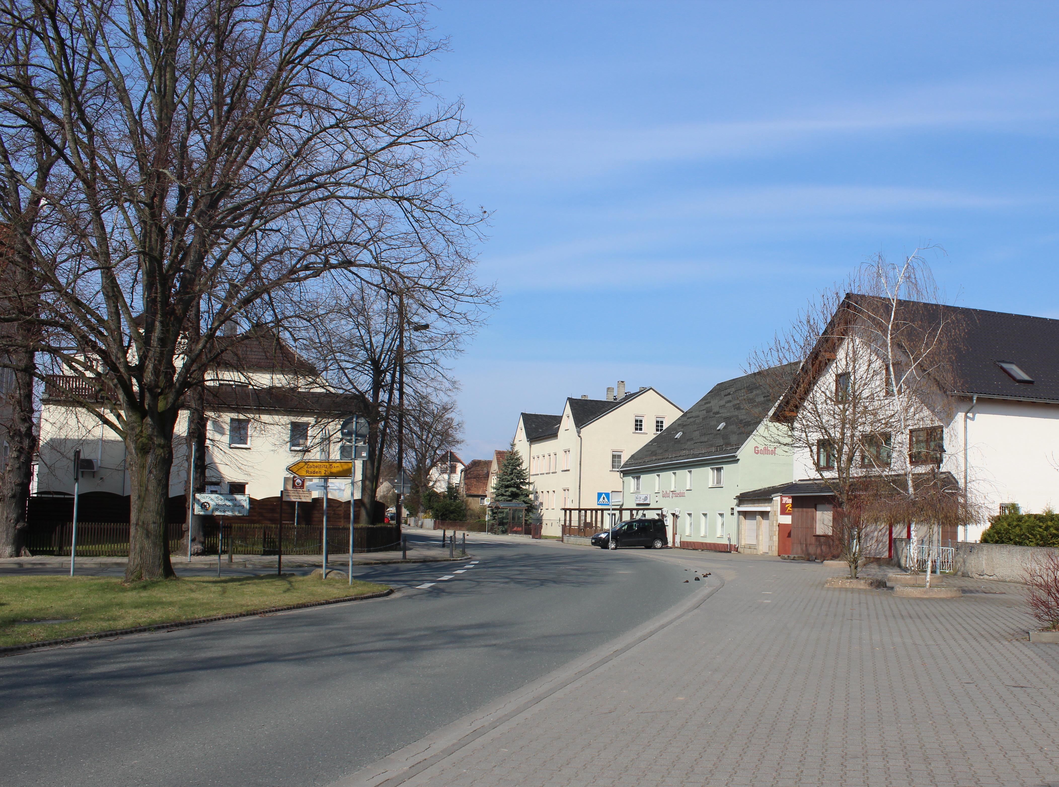 Frauenhain (Röderaue) Hauptstraße.